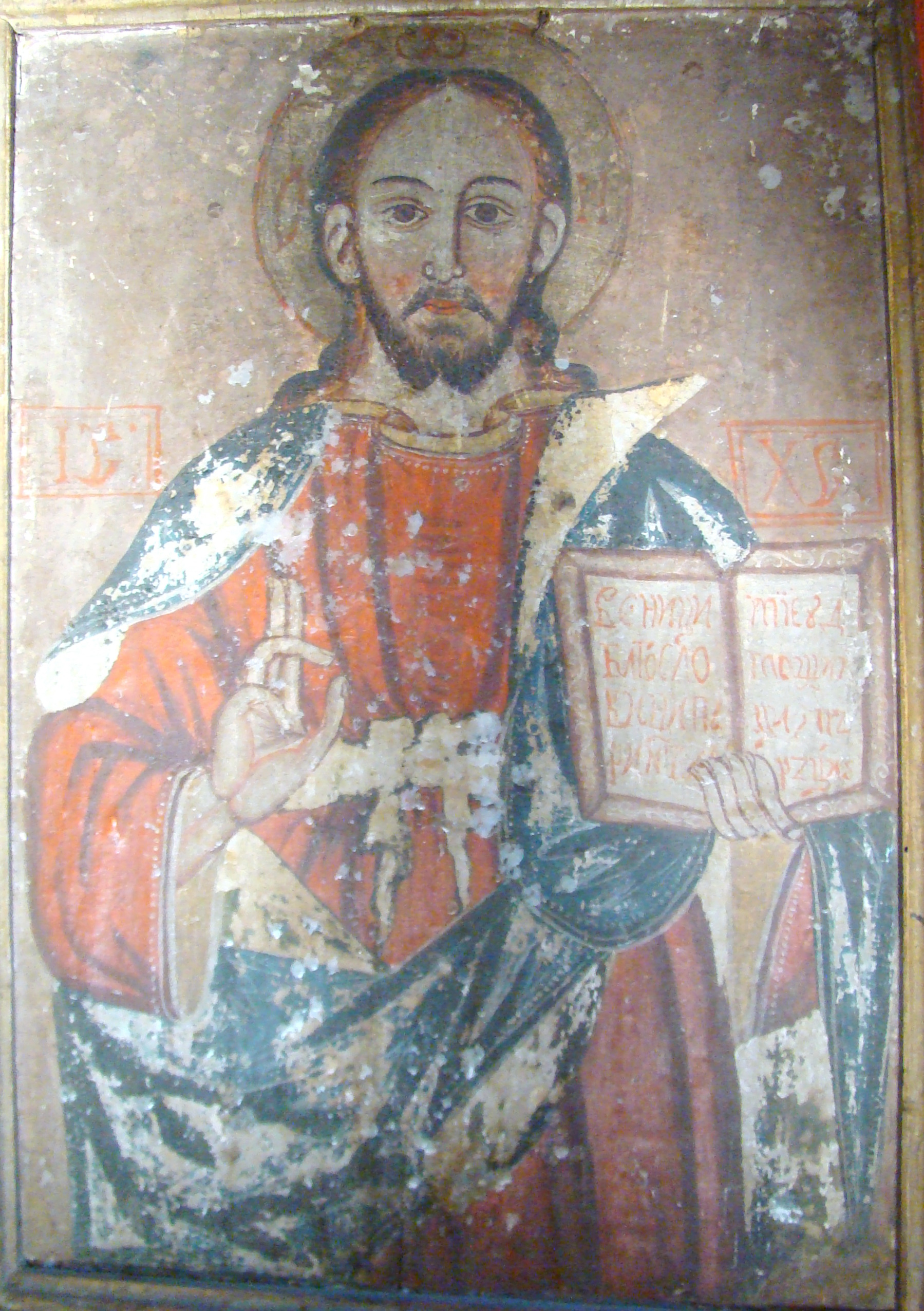 Biserica de lemn "Cuvioasa Paraschiva" , sat STEJERA; comuna MIREŞU MARE